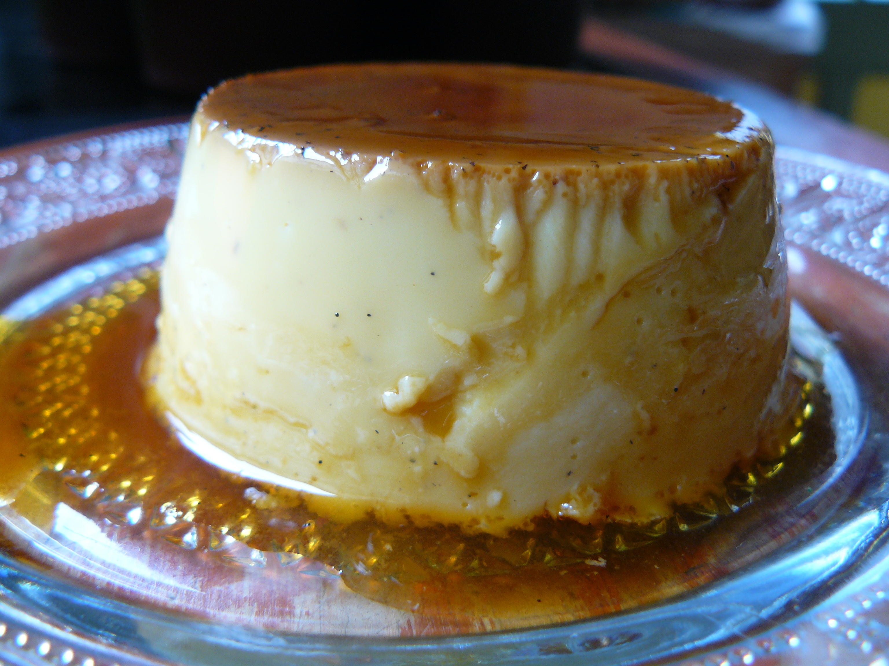 Un flan.